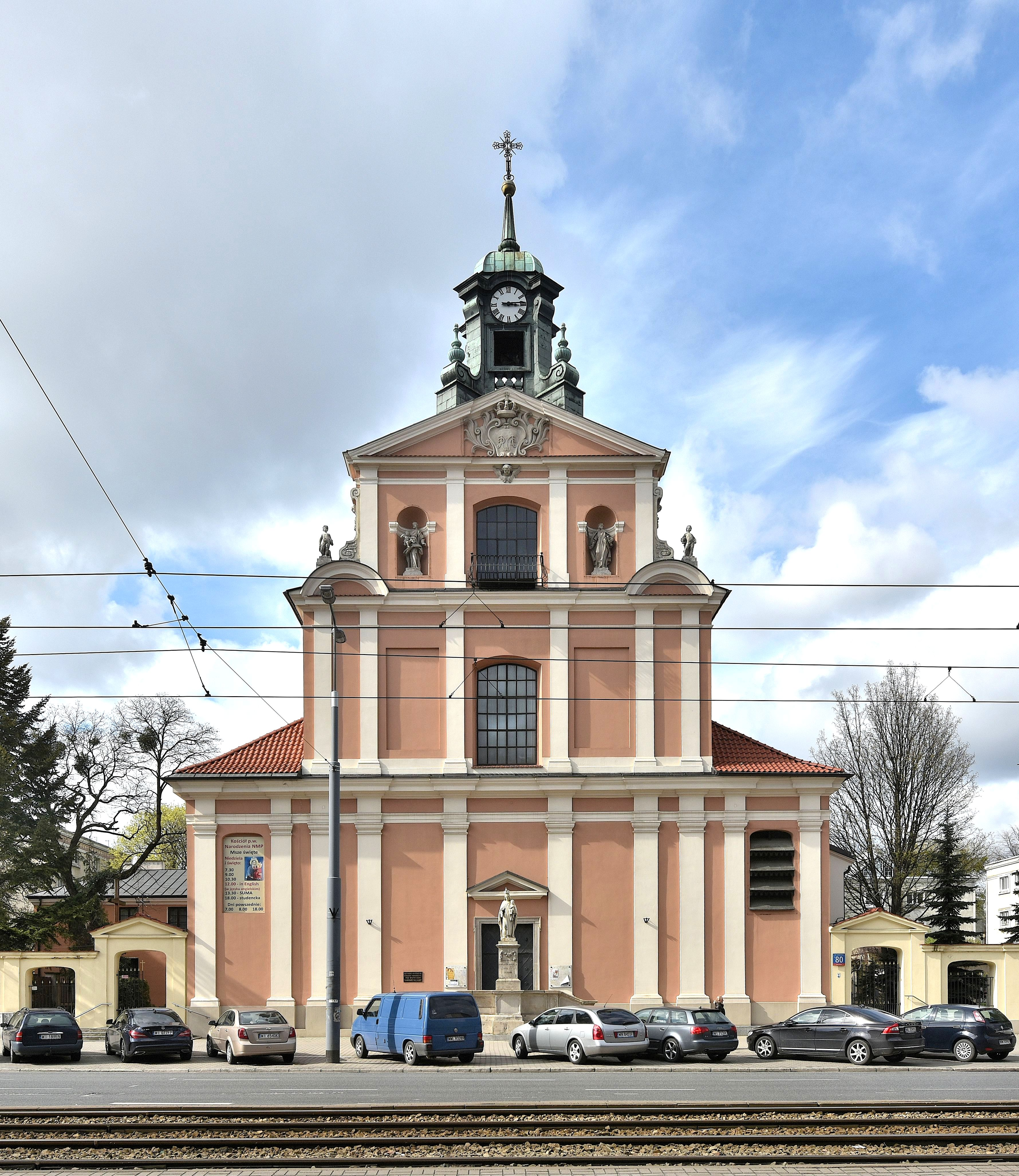 Kościół Narodzenia Najświętszej Maryi Panny w Warszawie